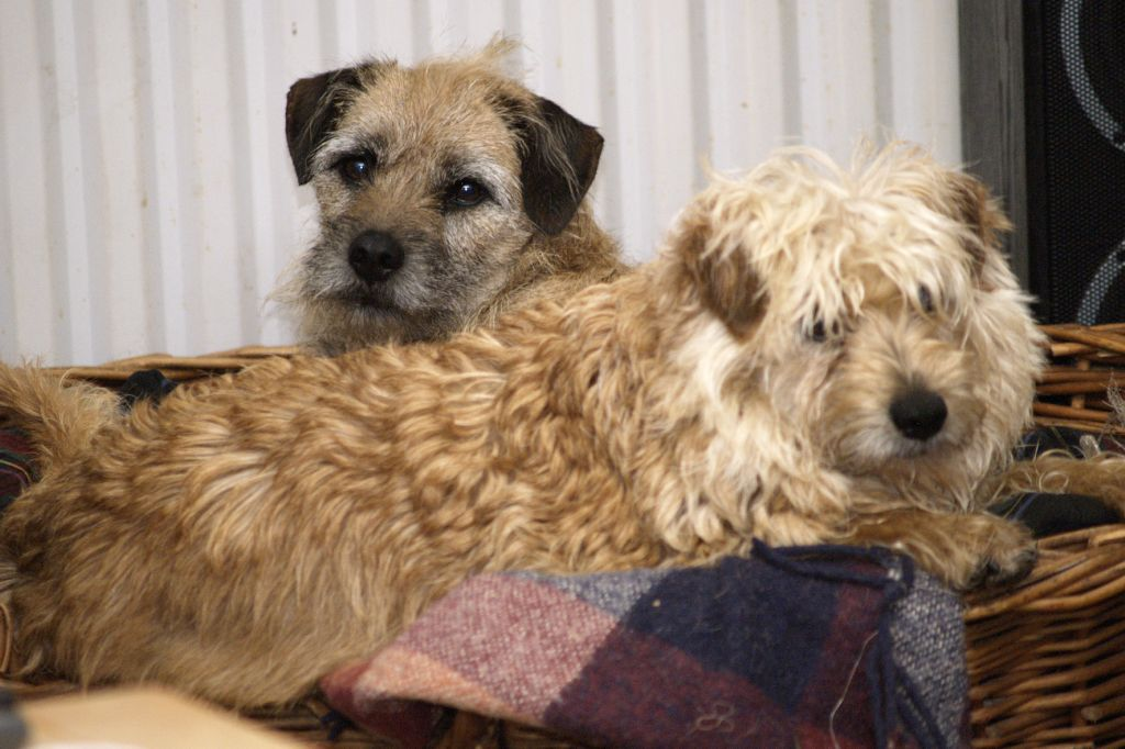 Hollandse smoushonden, zelfgemaakte foto Categorie:Afbeelding hond